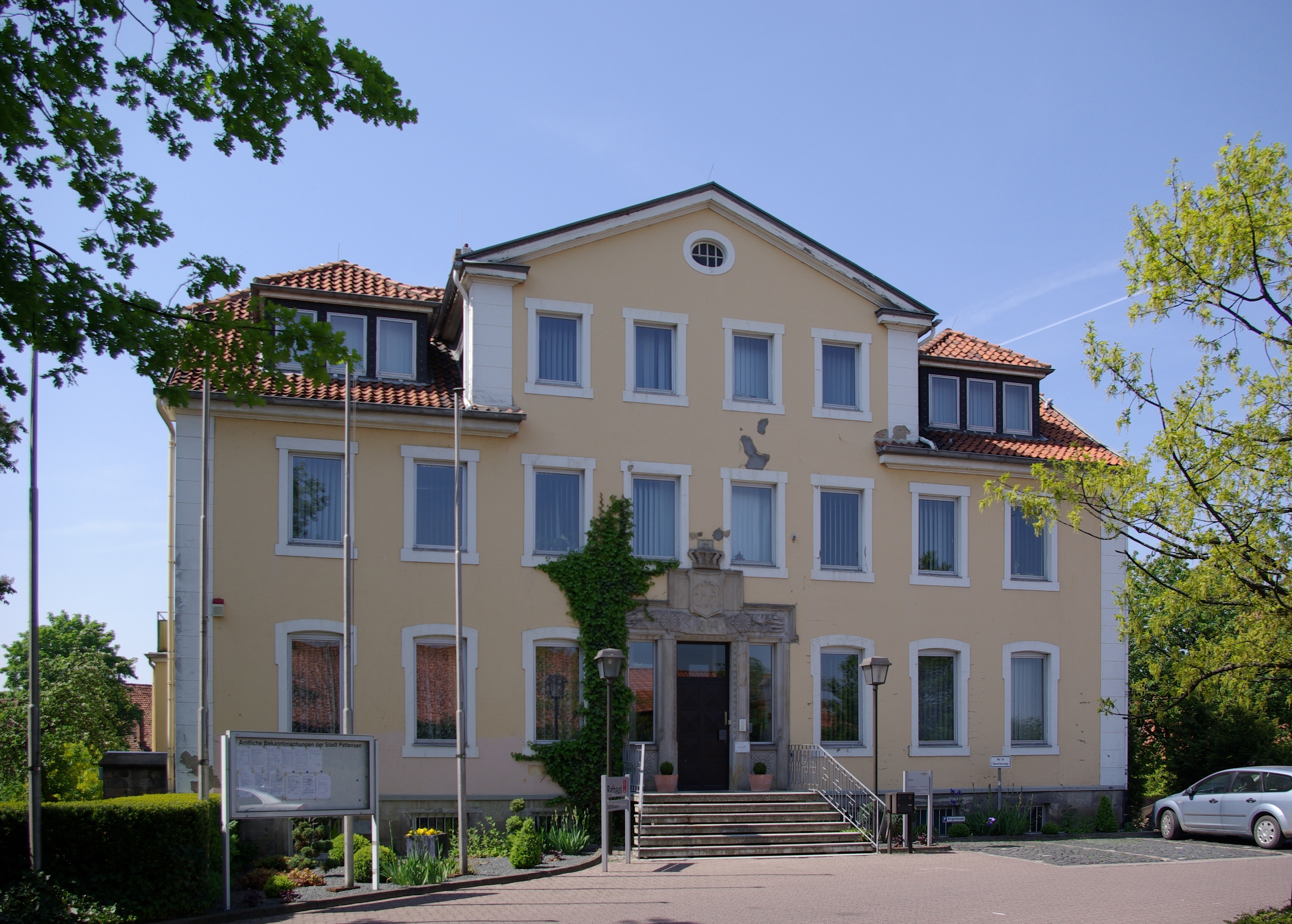 Pattensen bei Hannover. Das Rathaus von Patttensen. Hier befand sich früher die Burg.